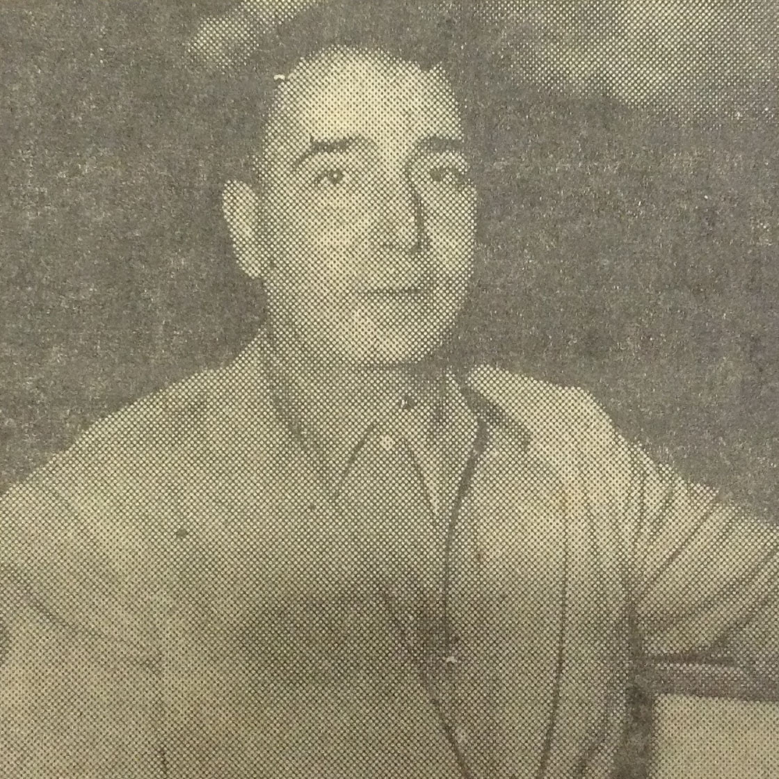 O escritor e dramaturgo argentino Tulio Carella, foto de 1960, no Brasil (Diário de Pernambuco)